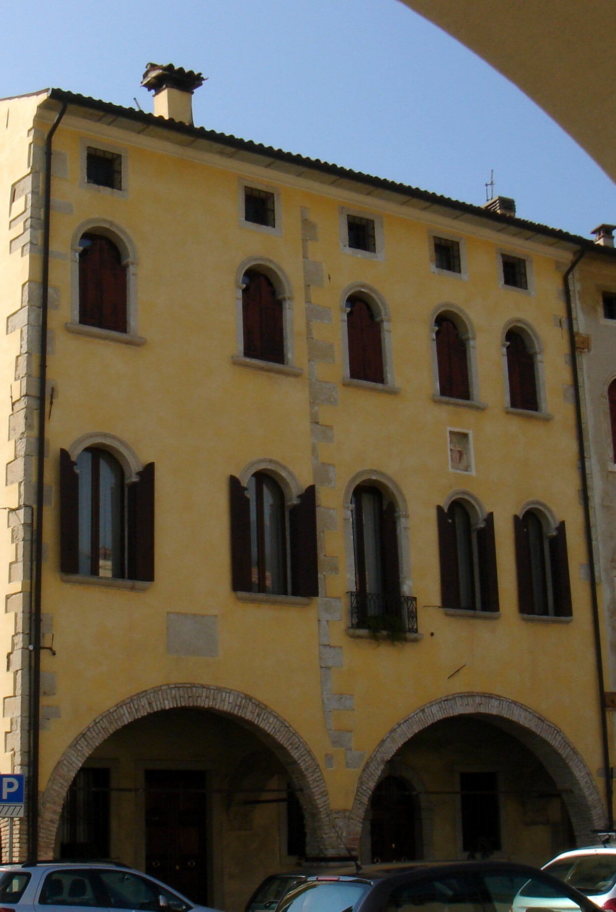 Serravalle (TV): facciata di Palazzo Flaminio, dimora quattrocentesca di Marcantonio.